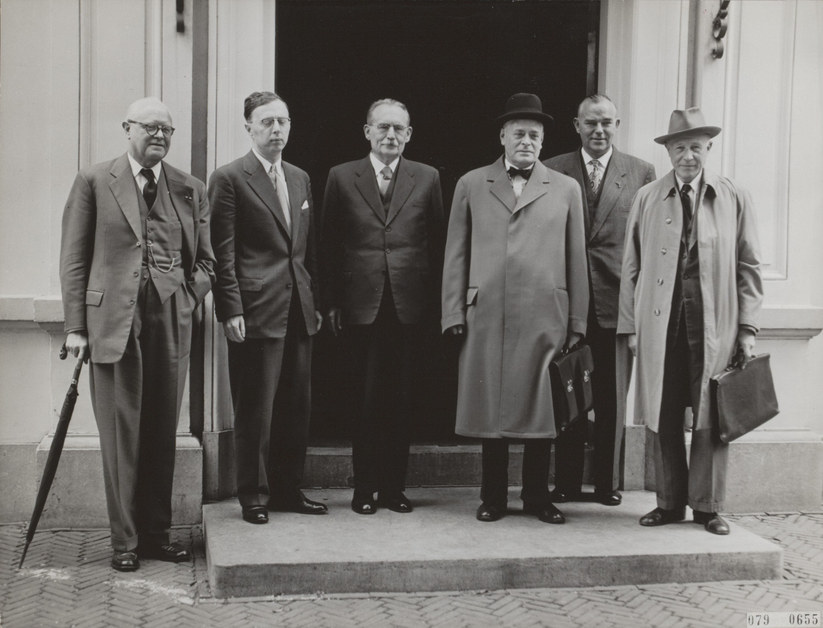 Collectie / Archief : Fotocollectie Elsevier Reportage / Serie : [ onbekend ] Beschrijving : Minister-president Dr. Drees ontvangt de fractievoorzitters van de vijf grootste partijen. Bij de ambtswoning op Plein 1813, vlnr prof. C. P. M. Romme , prof. dr. J. Zijlstra , dr. W. Drees, prof. P.J. Oud, mr. J. W. A. Burger en H. W. Tilanus Datum : 20 juni 1955 Locatie : Den Haag, Zuid-Holland Trefwoorden : ministers, politici, politiek Persoonsnaam : Burger, J.W.A., Drees, Willem, Oud, P.J., Romme, C.P.M, Tilanus H.W., Zijlstra, J. Fotograaf : Pot, Harry / Anefo Auteursrechthebbende : Nationaal Archief Materiaalsoort : Foto (zwart/wit) Nummer archiefinventaris : bekijk toegang 2.24.05.02 Bestanddeelnummer : 079-0655